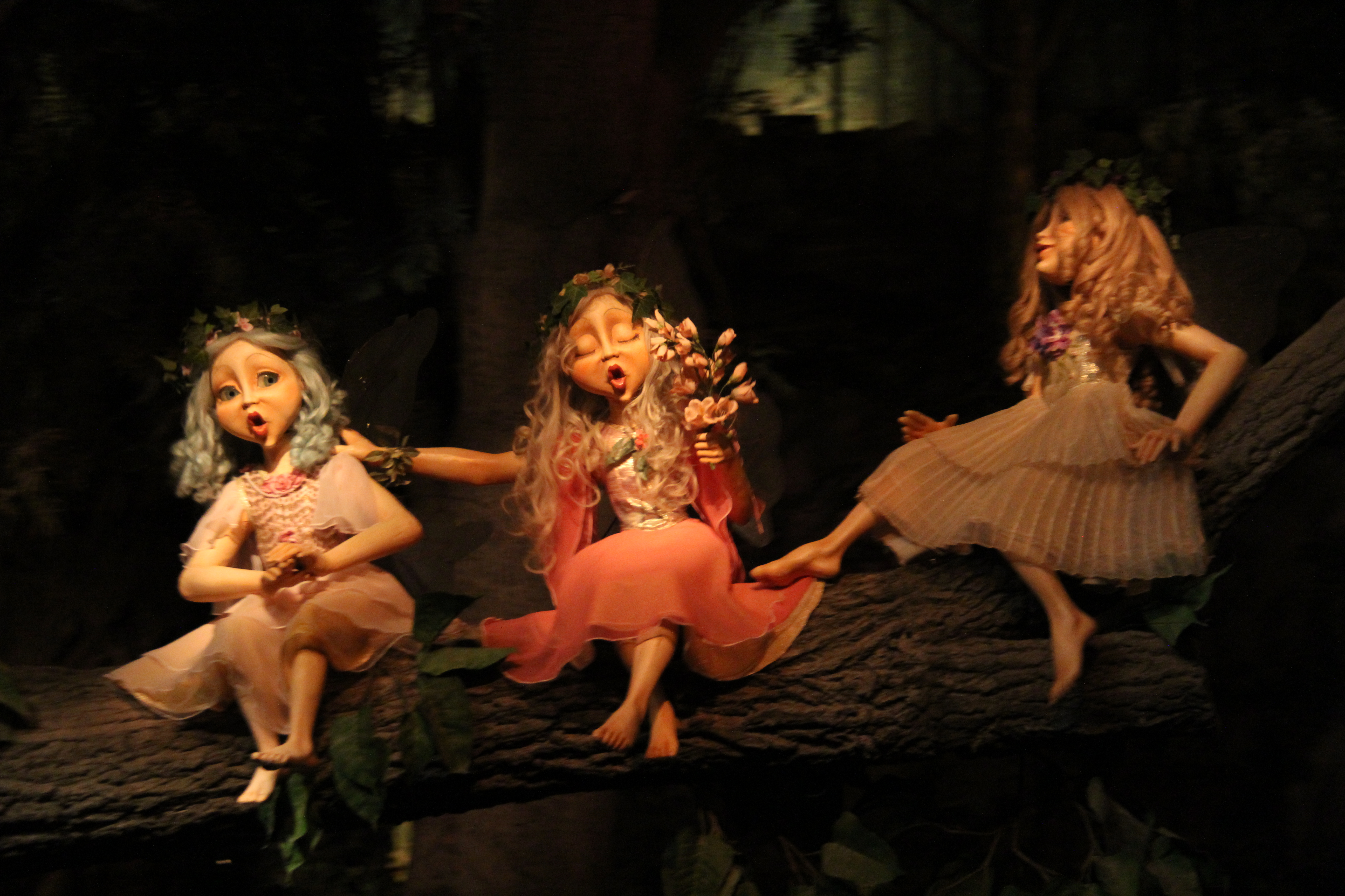 De attractie Droomvlucht in De Efteling